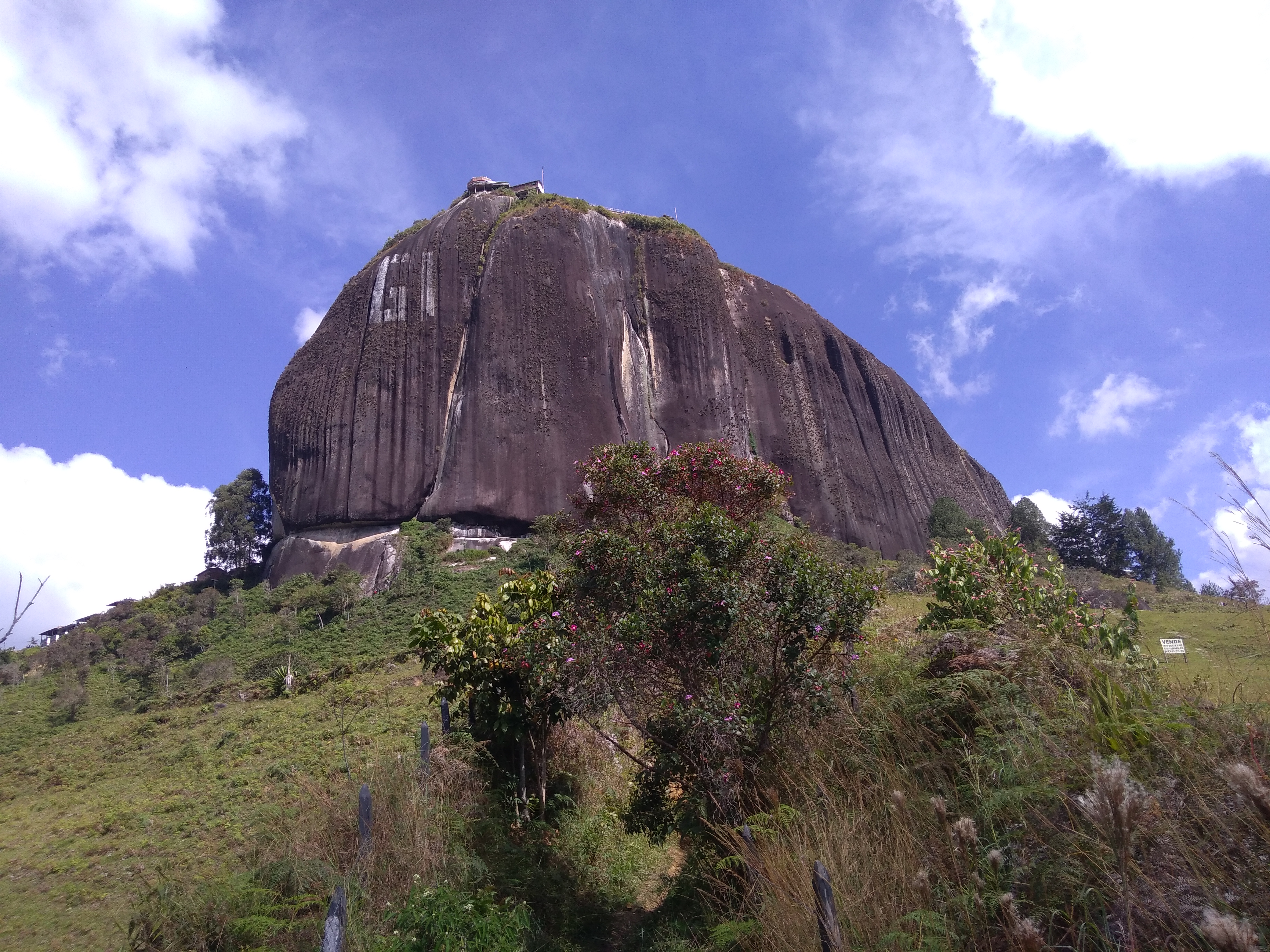 Esta fotografía fue tomada en el municipio colombiano con código 05321.